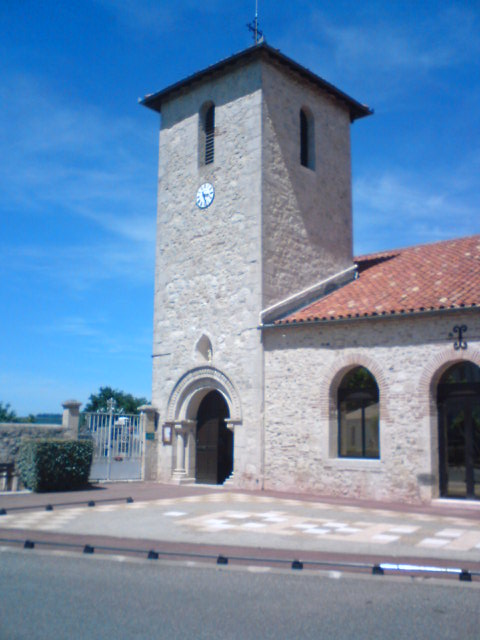 Église de Brax